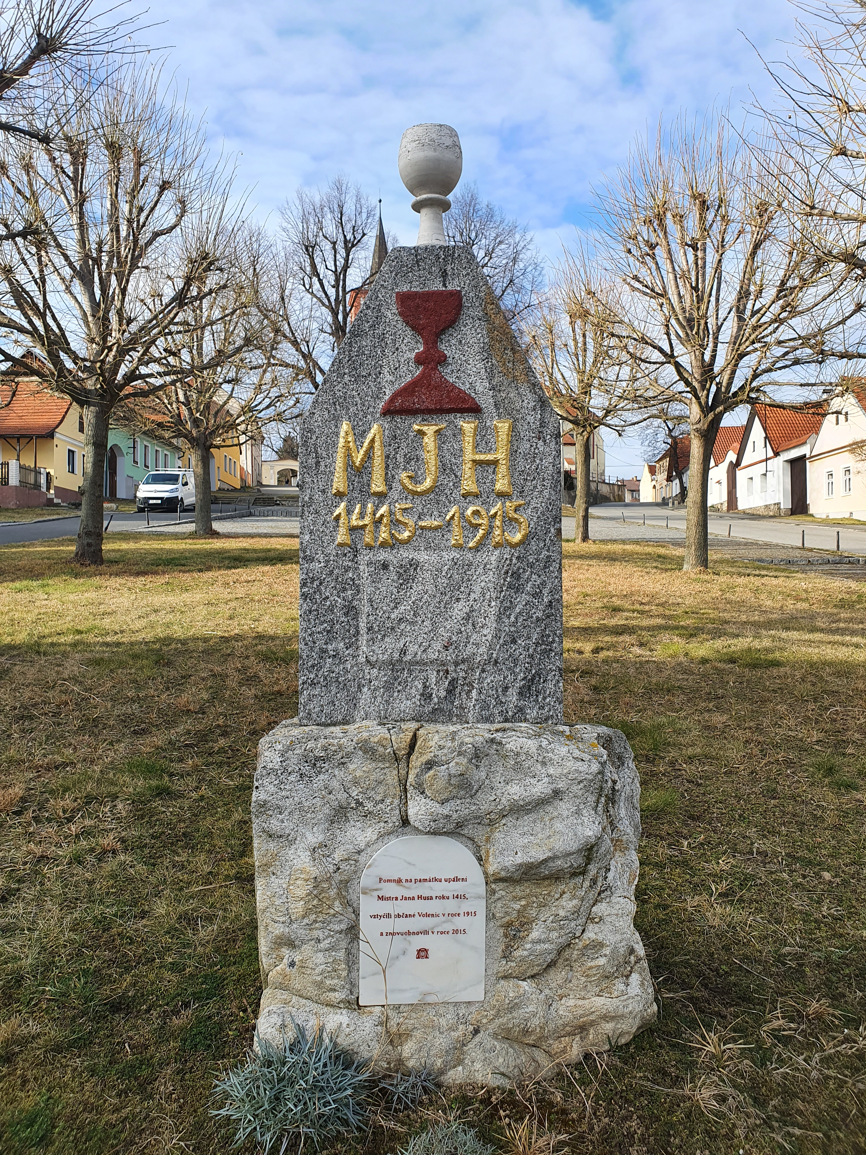 Gedenkstein an die Verbrennung von Jan Hus